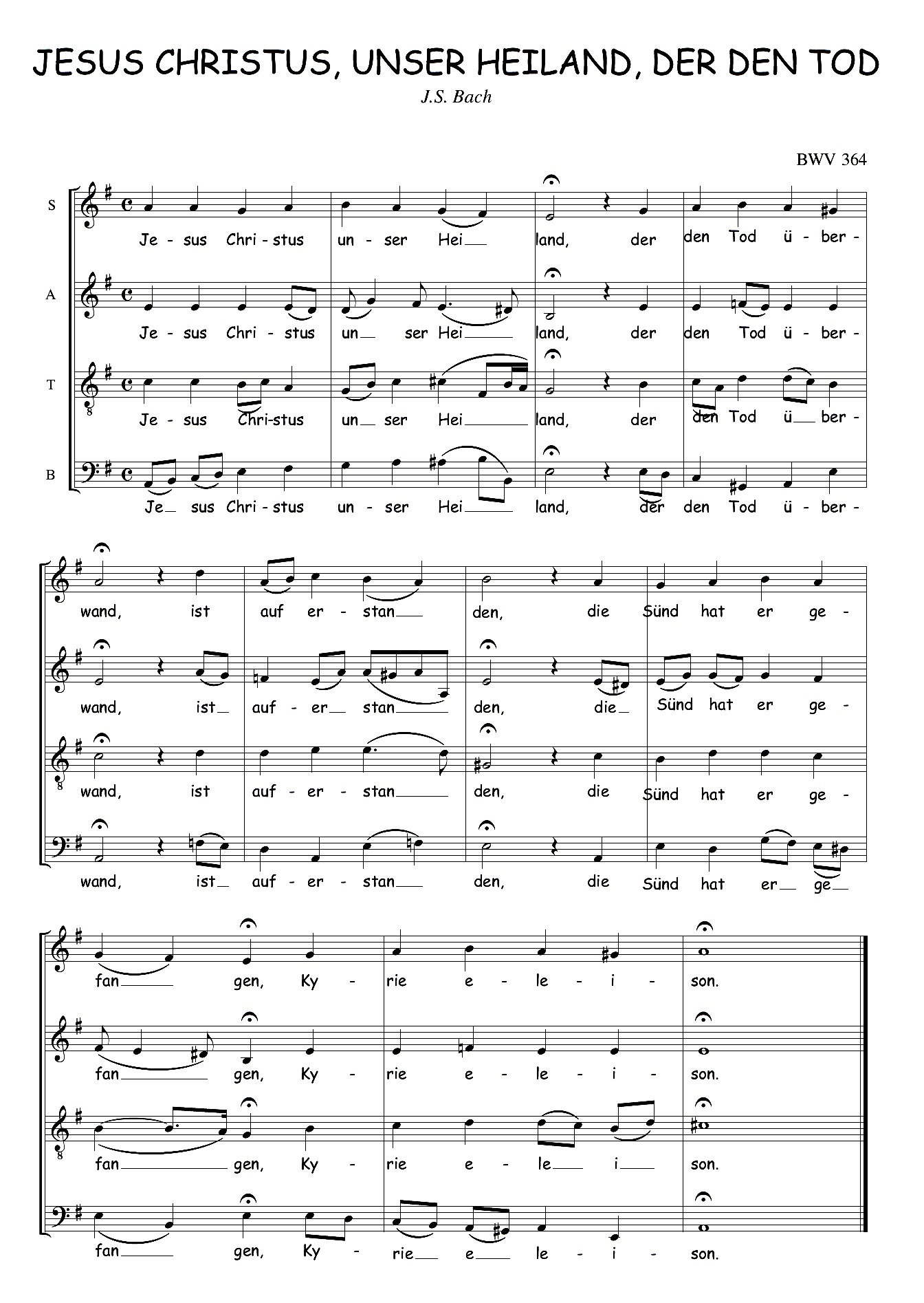 Johann Sebastian Bach: Jesus Christus, unser Heiland, der den Tod überwand, vierstimmiger Choralsatz, BWV 364